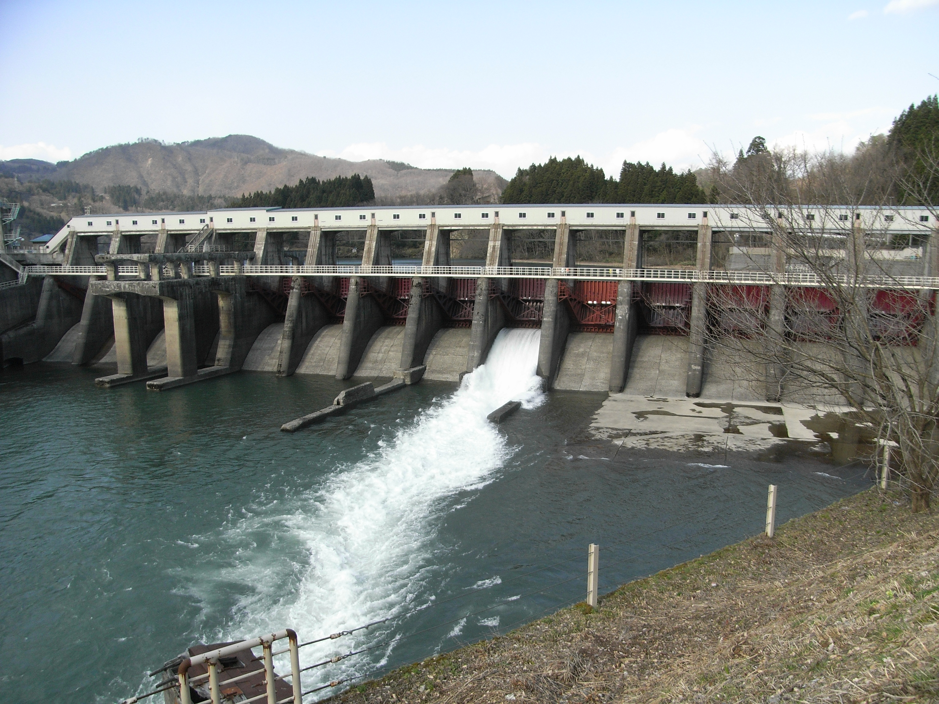 Dam